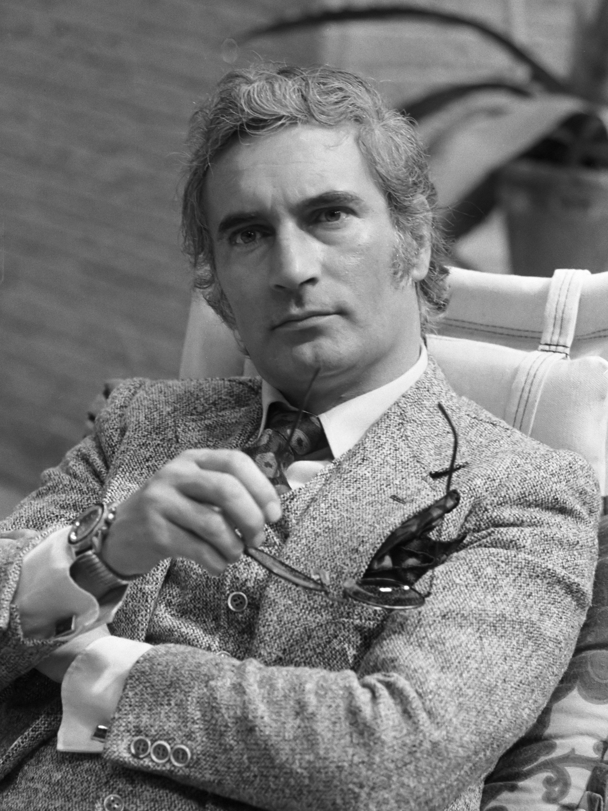 Martha (TV, KRO), Maxim Hamel 7 mei 1974